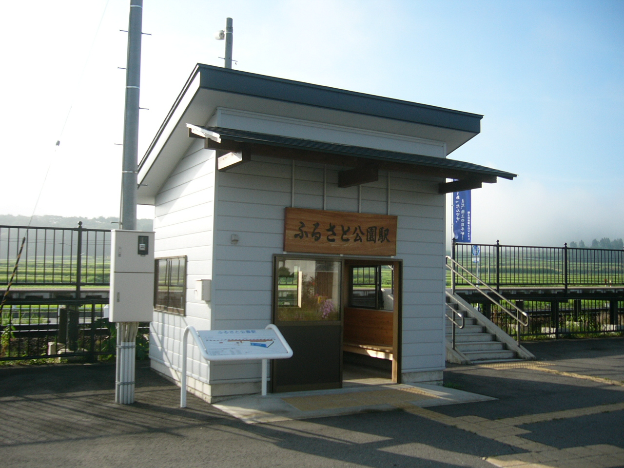 Furusatokoen Station